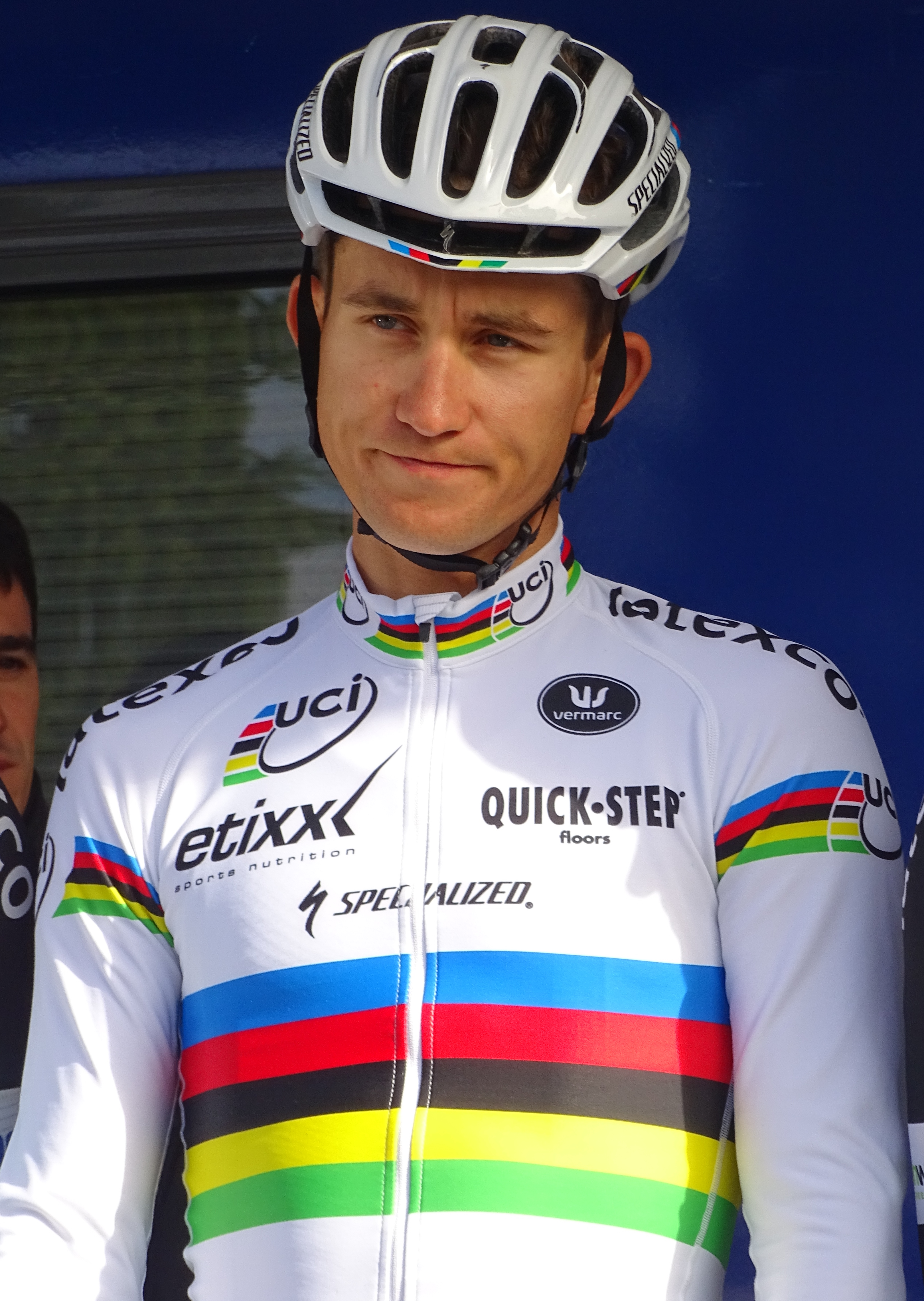 Reportage réalisé le dimanche 6 septembre à l'occasion du départ et de l'arrivée du Grand Prix de Fourmies 2015 à Fourmies, Nord-Pas-de-Calais, France.